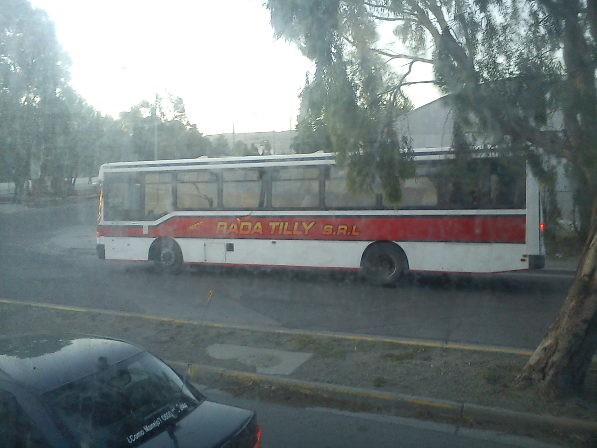 Colectivo de Rada Tilly en Comodoro Rivadavia